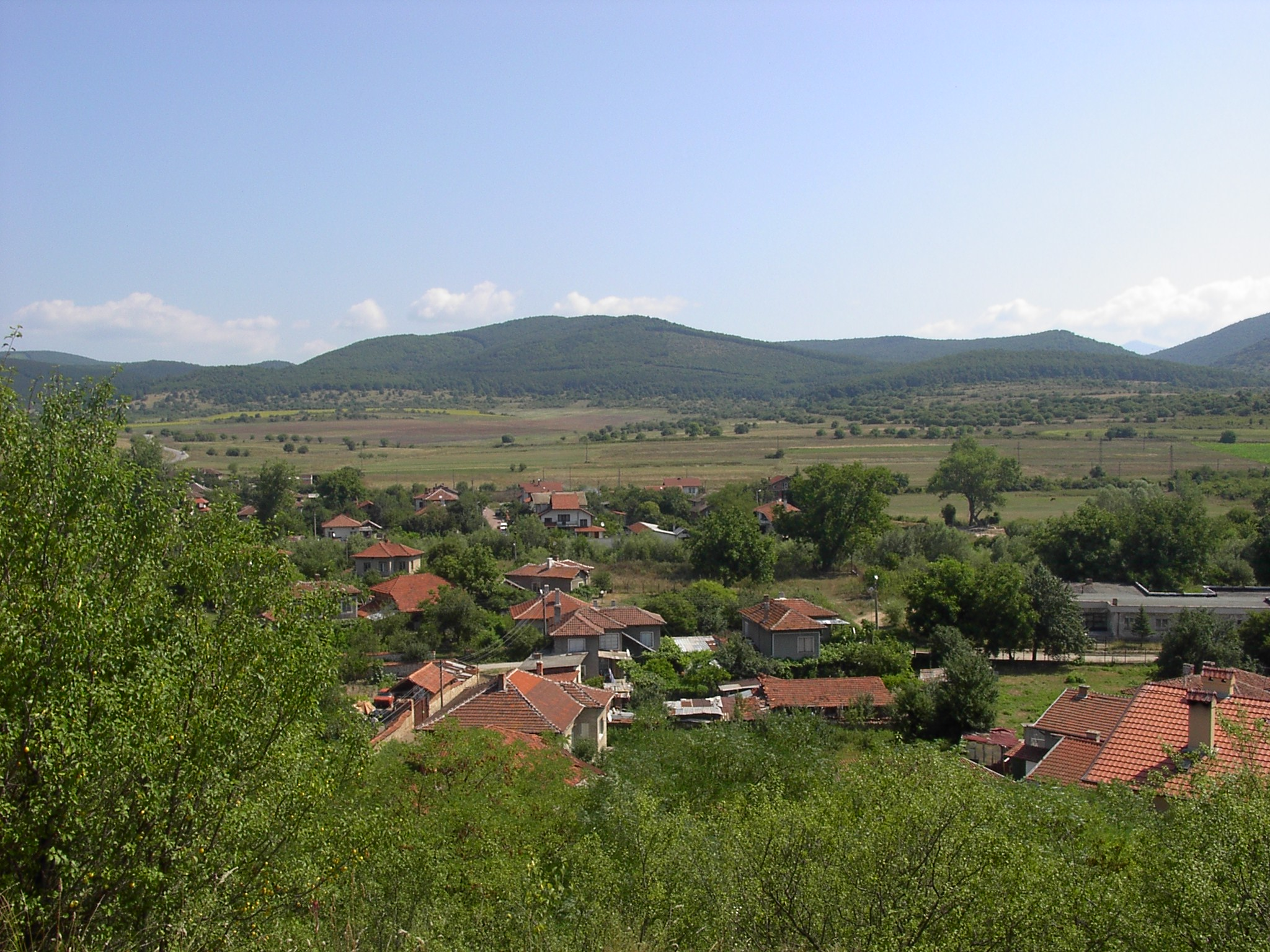 Общ изглед от местността "Огорелината".